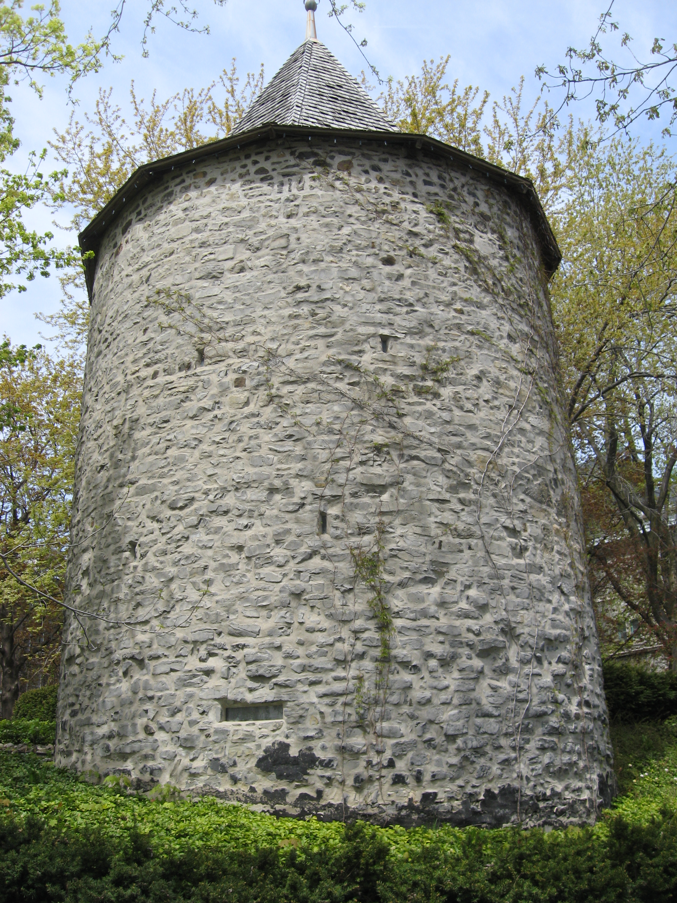 Tours de l'ancien Fort de la Montagne sur la propriété du Grand Séminaire de Montréal, rue Sherbrooke, Montréal (ca 1685)